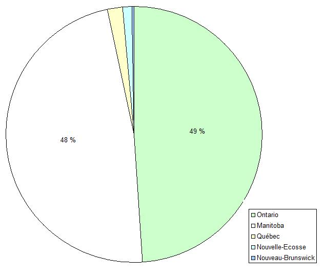 Province natale, lors du recensement de 1891, de la population de Gladstone (Manitoba, Canada).